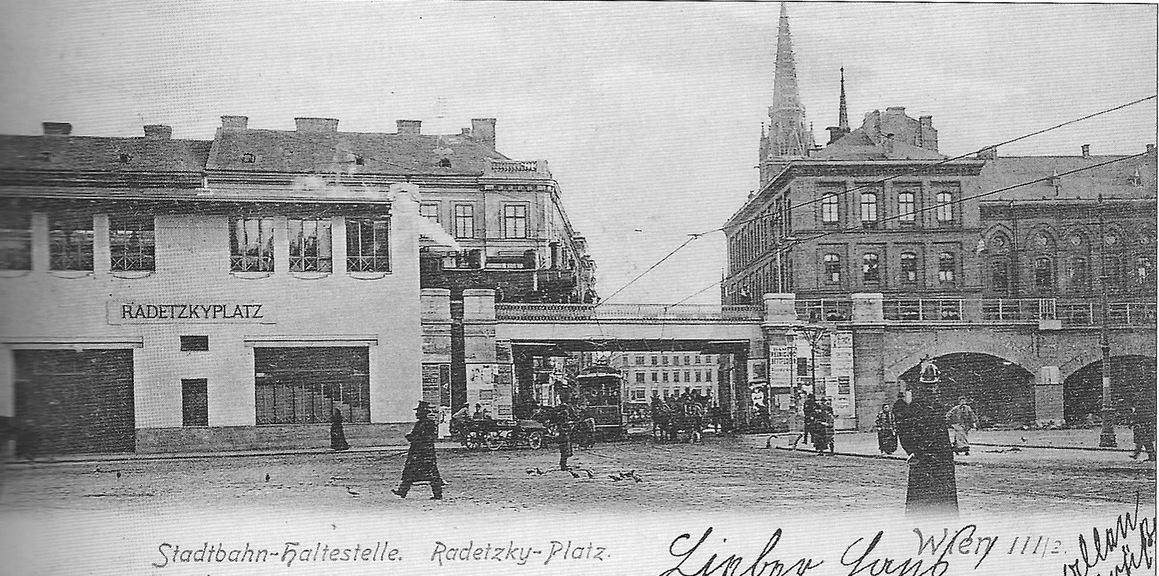 Bahnhaltestelle Radetzkyplatz, unter der Brücke eine Straßenbahn